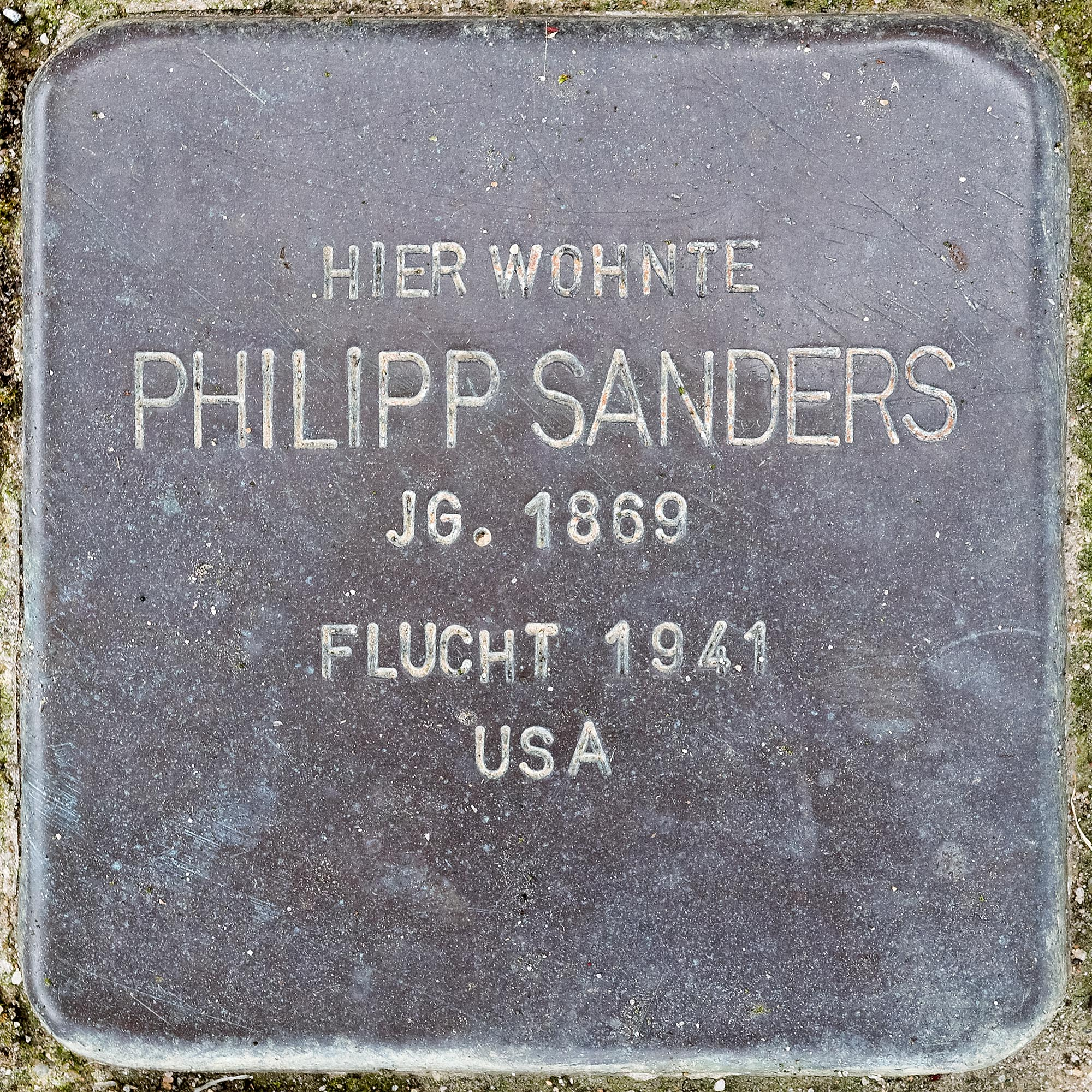 Stolperstein Sanders, Philipp